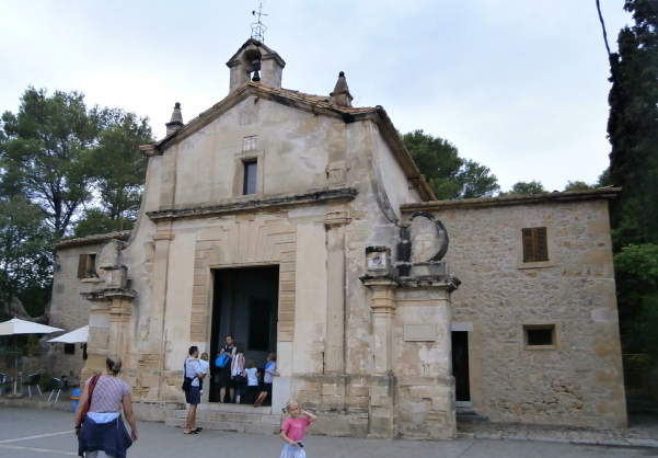 Kapelle auf dem Kalvarienberg in Pollenca